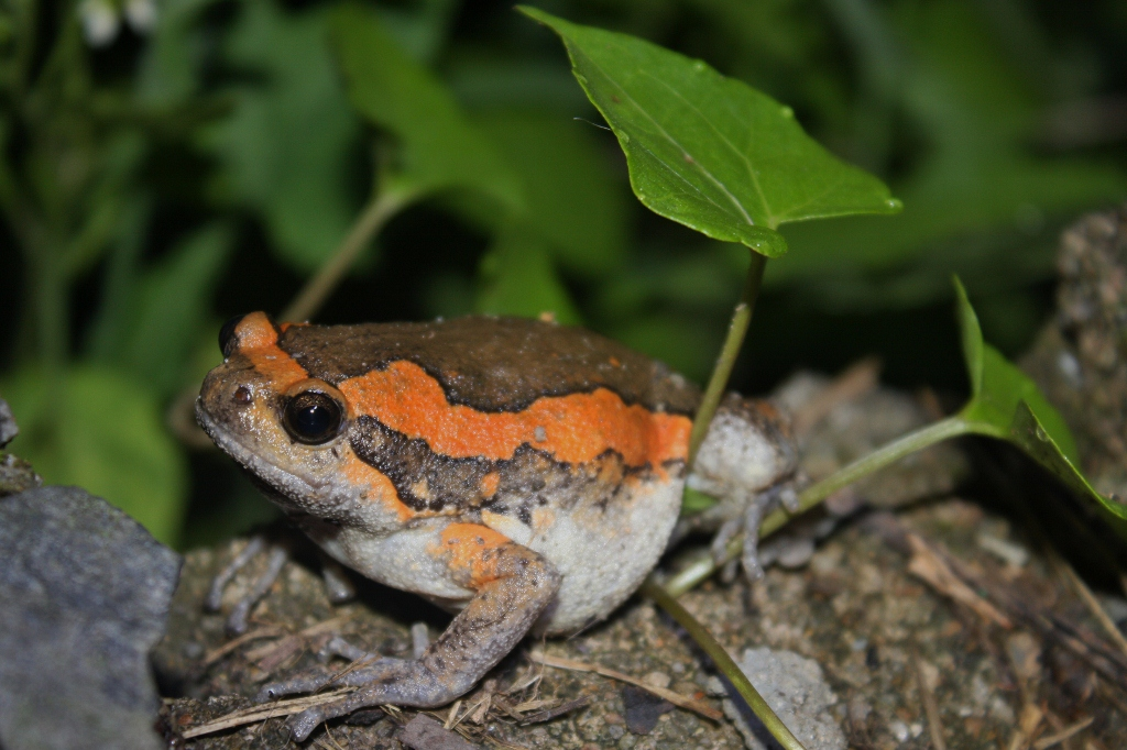 Taken at Mui Wo.